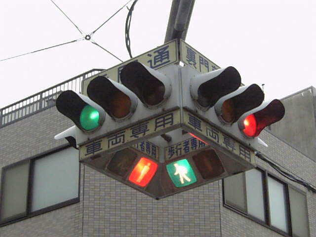 名古屋市の信号機